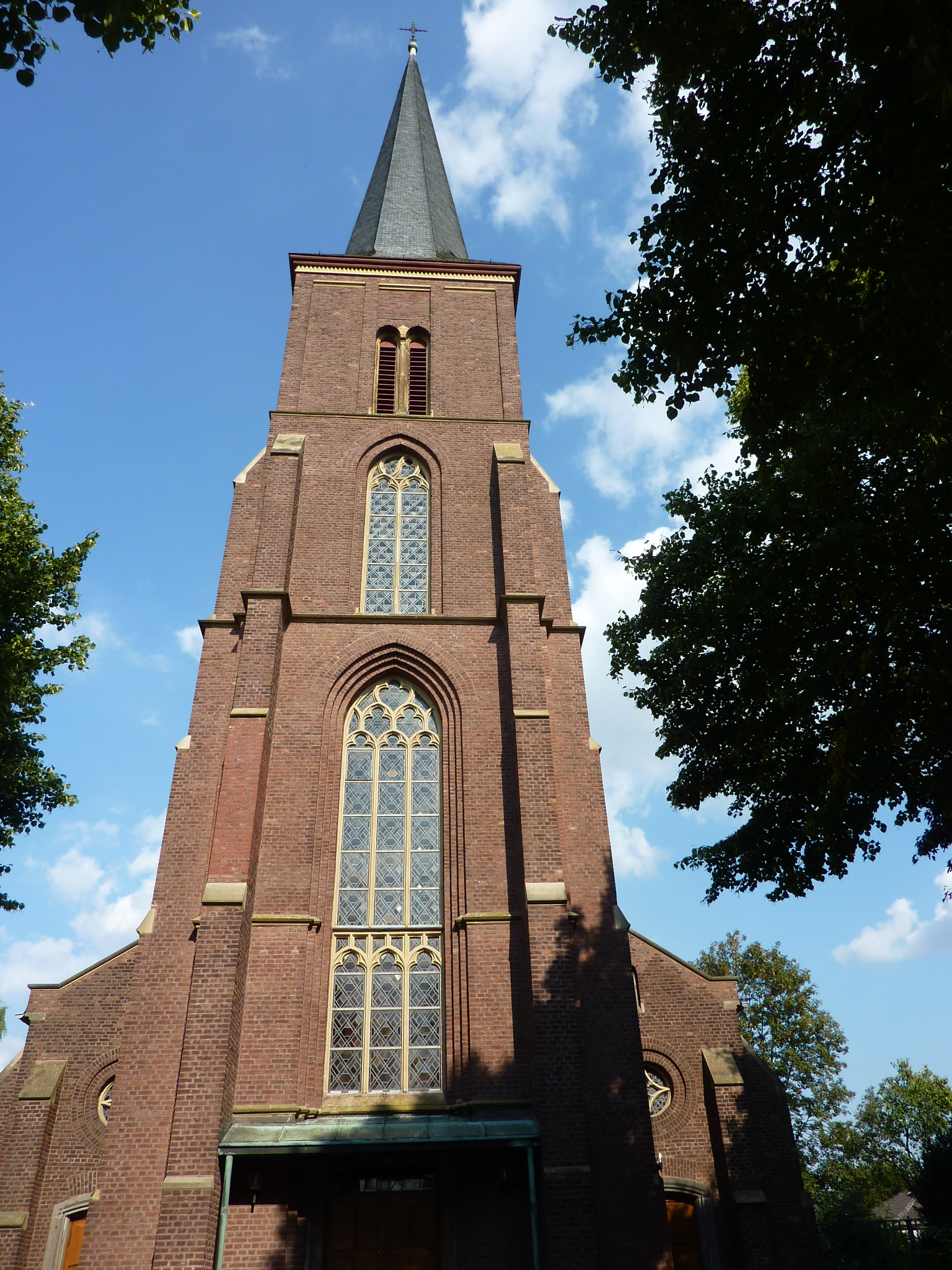 St. Dionysius (Korschenbroich)